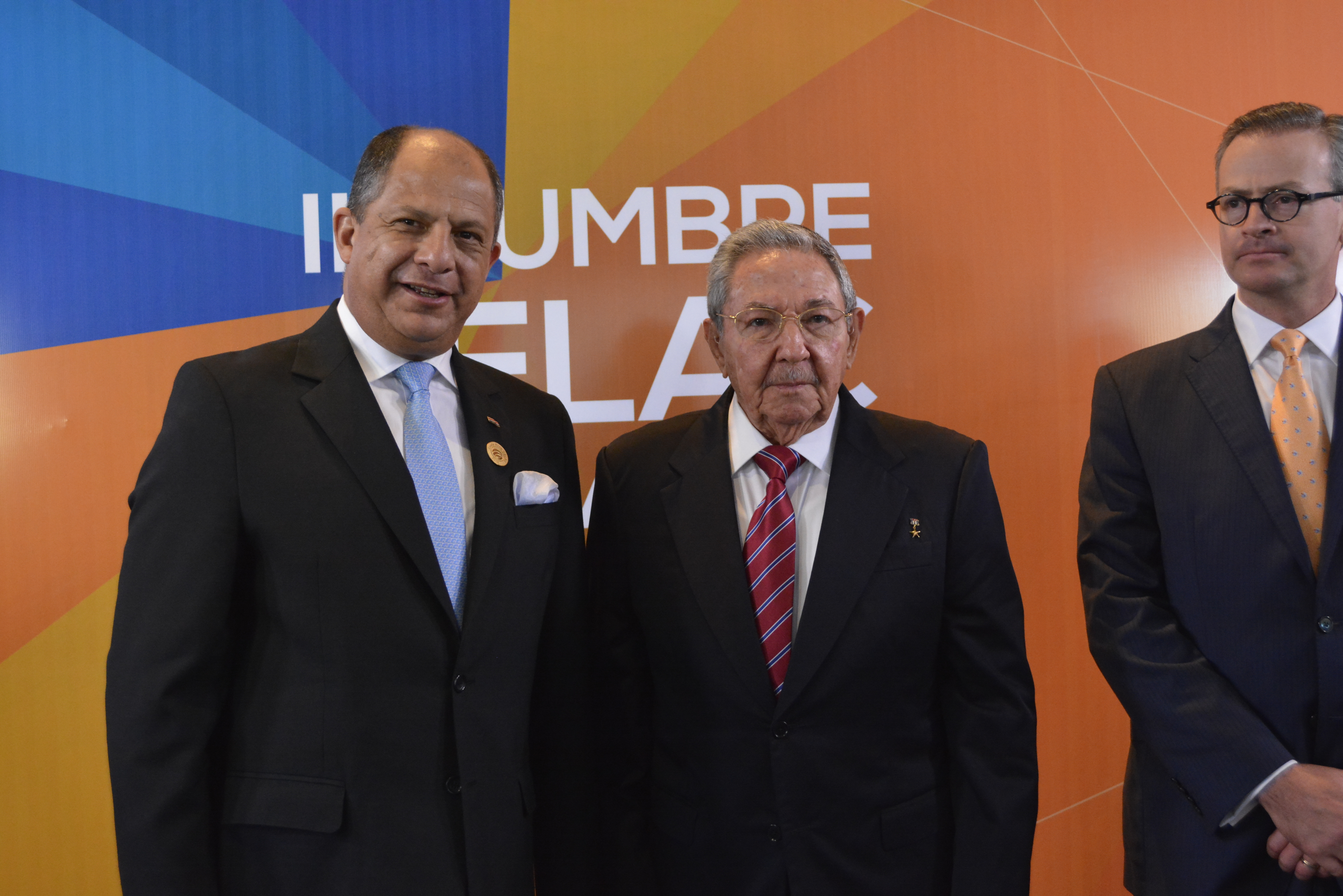 Llegada de varios jefes de Estado y de Gobierno a Costa Rica para la III Cumbre de la CELAC.